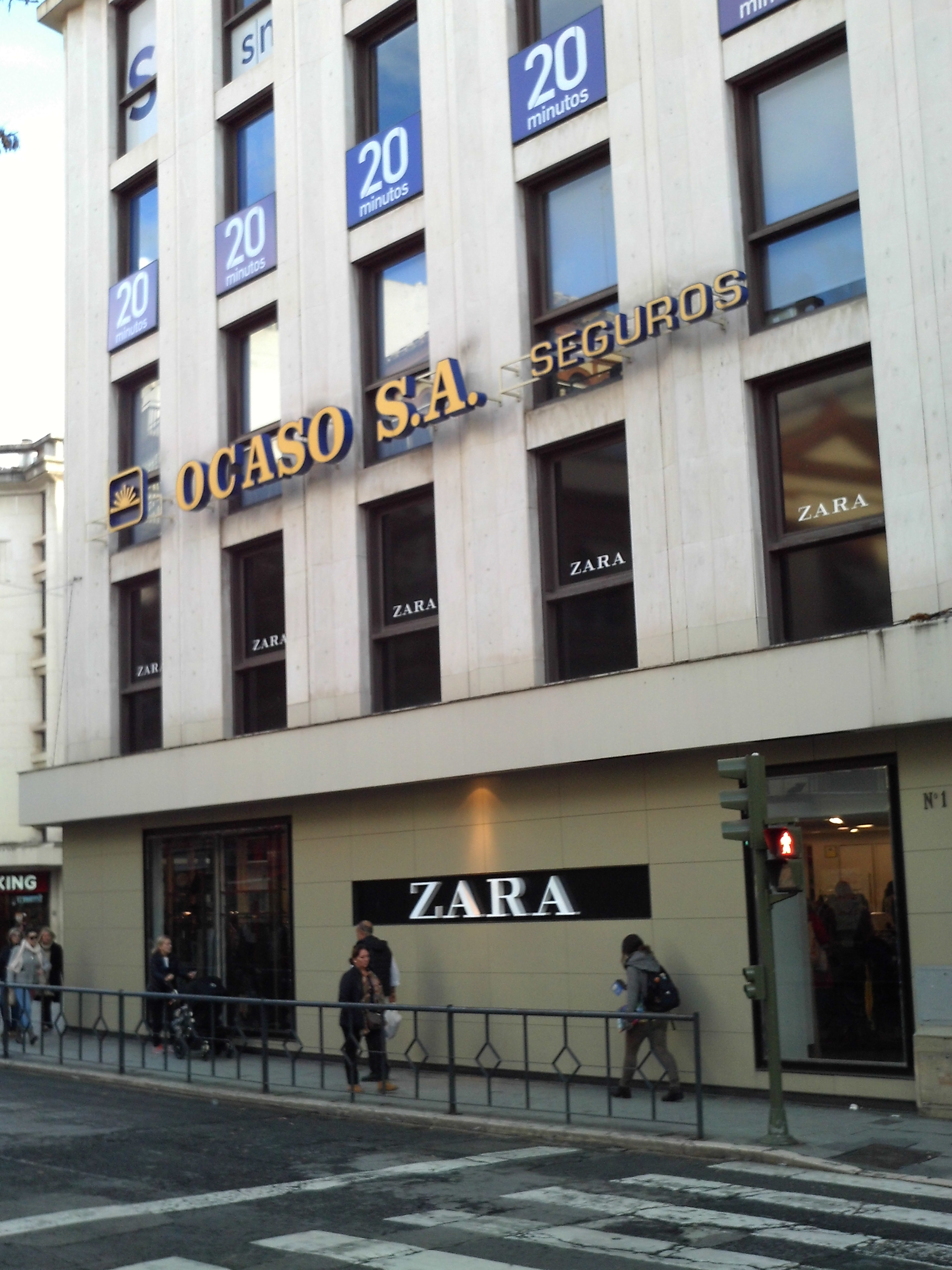 Tienda de Zara, oficinas de Seguros Ocaso y oficinas de 20 Minutos. Sevilla, Andalucía, España.